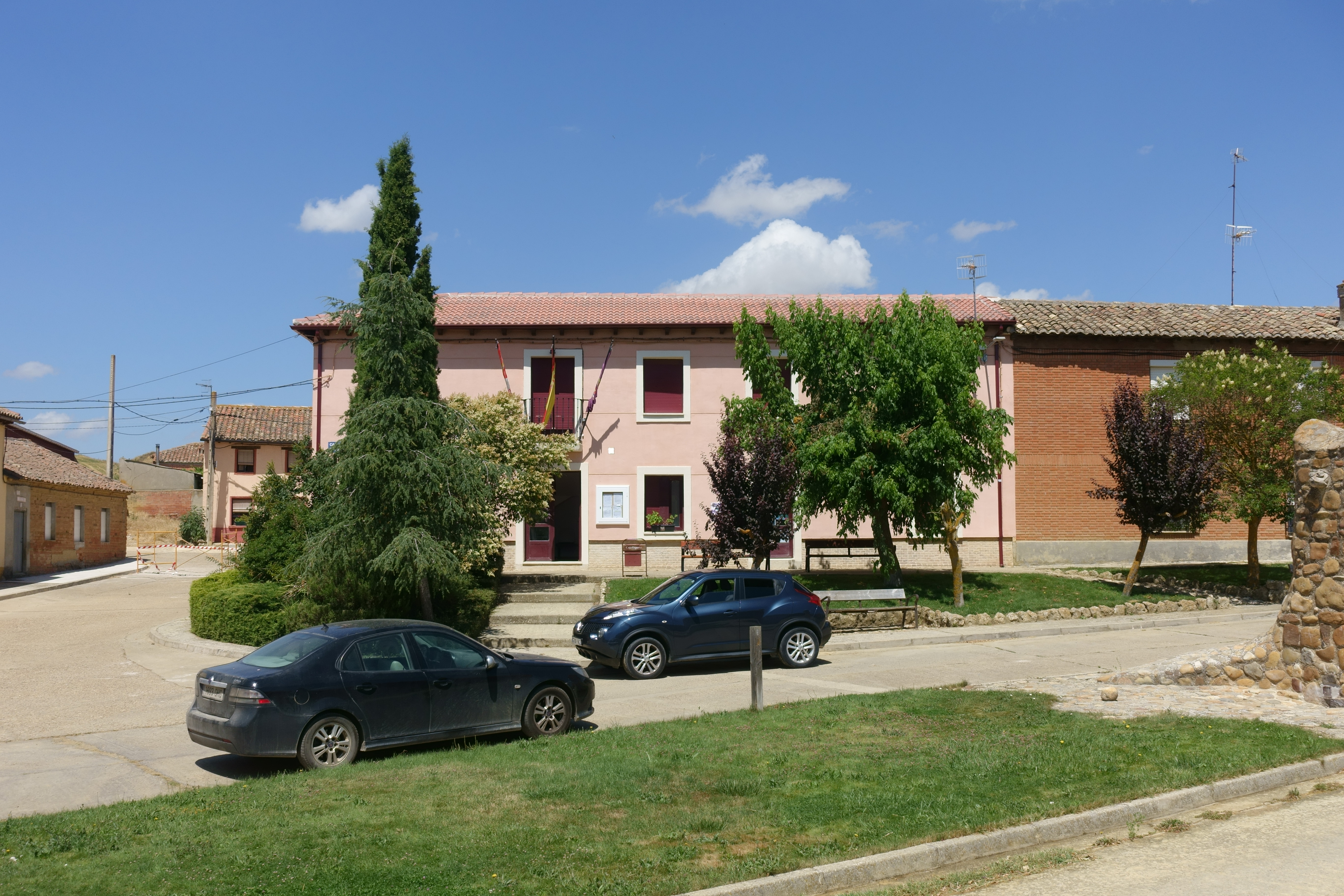 Casa consistorial de Lomas (Palencia, España).